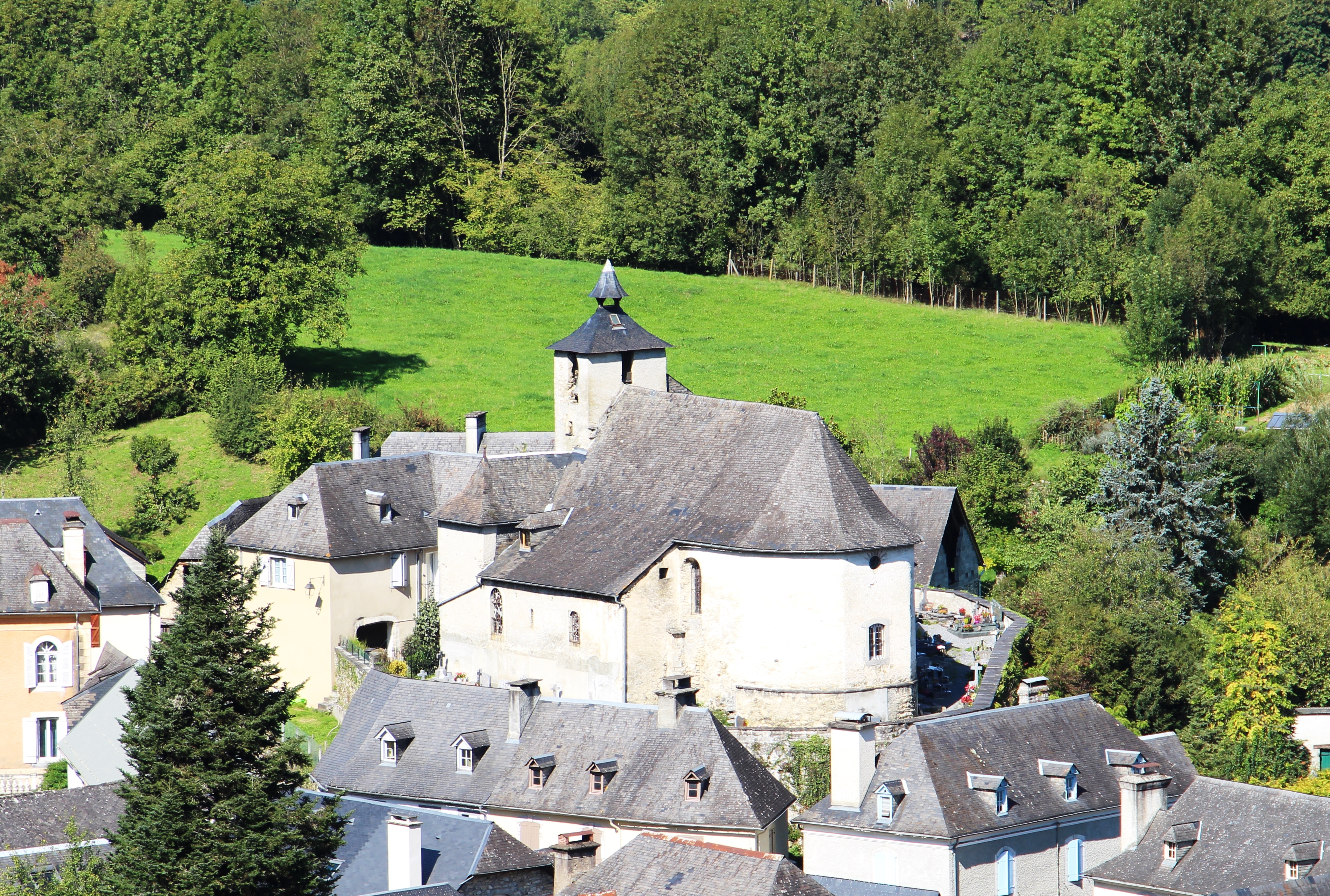 Église Saint-Celse de Cheust (Hautes-Pyrénées)